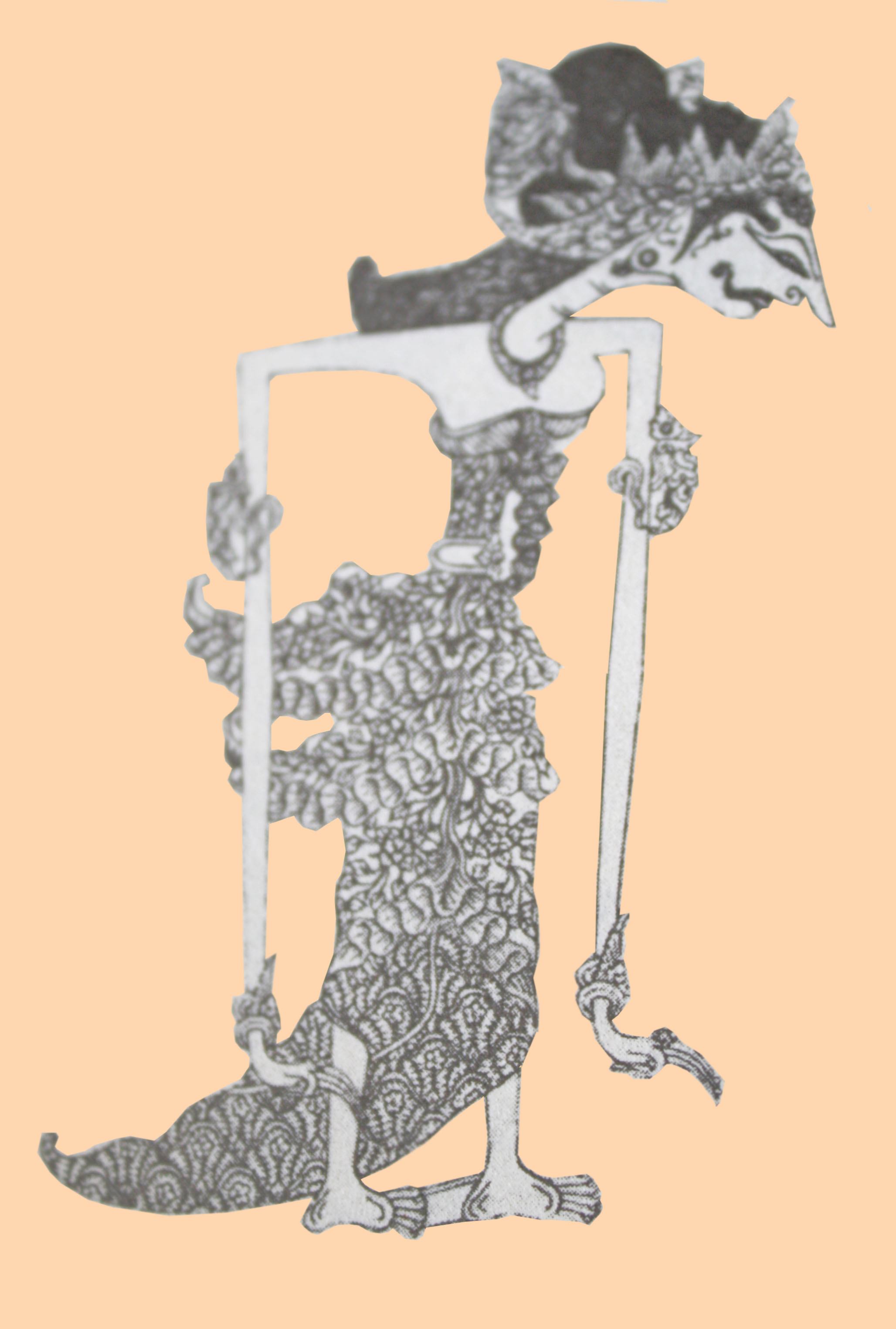 Paraga wayang Agnyanawati putri Prabu Narashinga